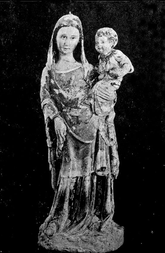 Nª Sª de los Milagros, sin trajes. Fotografía realizada antes de la guerra civil española.